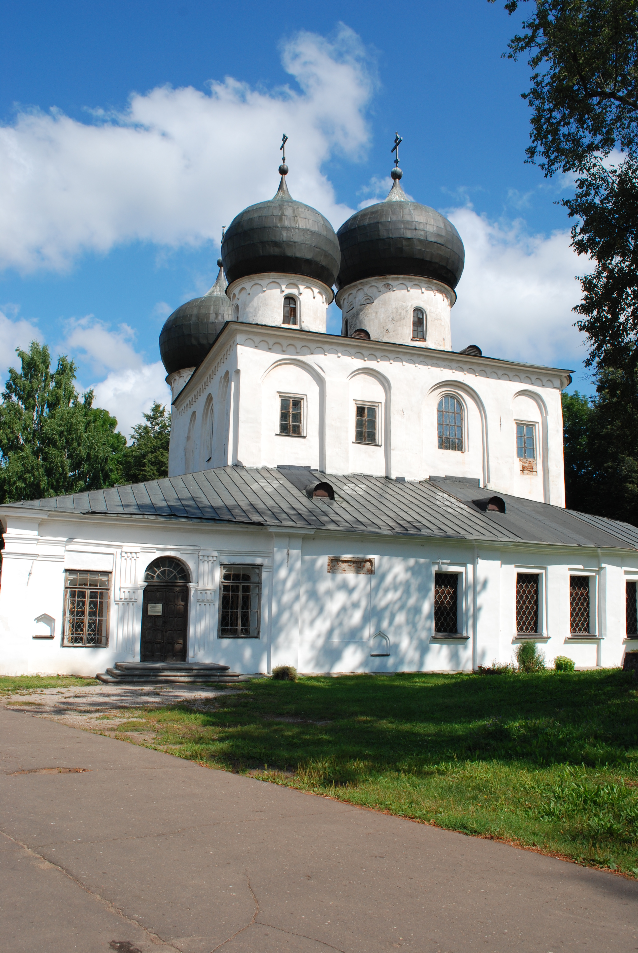 Монастырь Антониев (Новгородская область, Великий Новгород, Антоново)